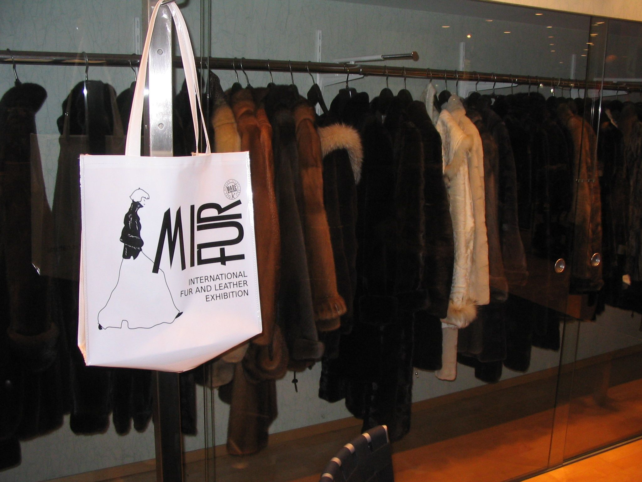 Pelzjacken und -mäntel, Ärmelparade. Gesehen bei Firma CHR. SCHAD PELZ UND LEDER, Ludwigshafen